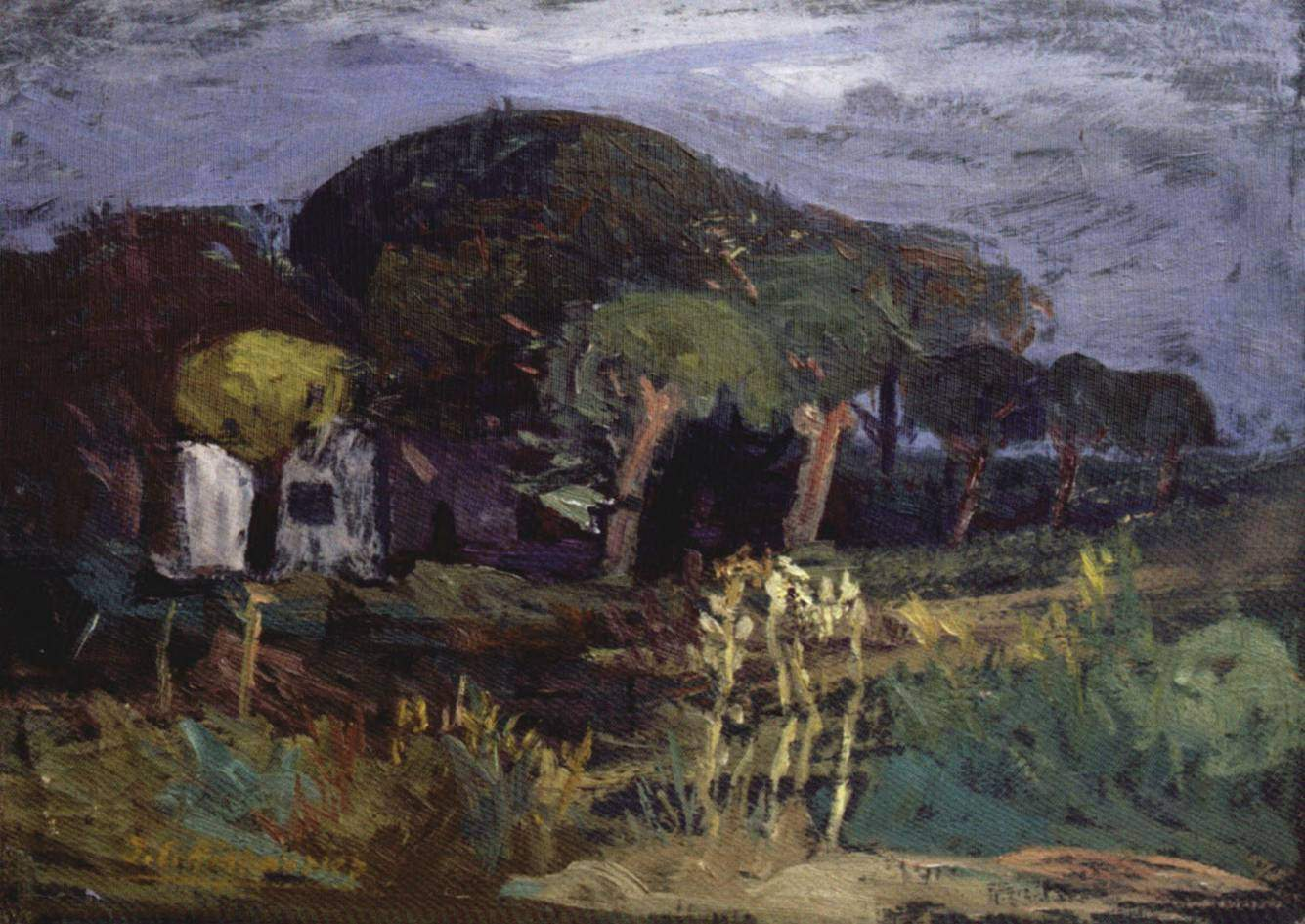 Foto Cuadro Migliavacca